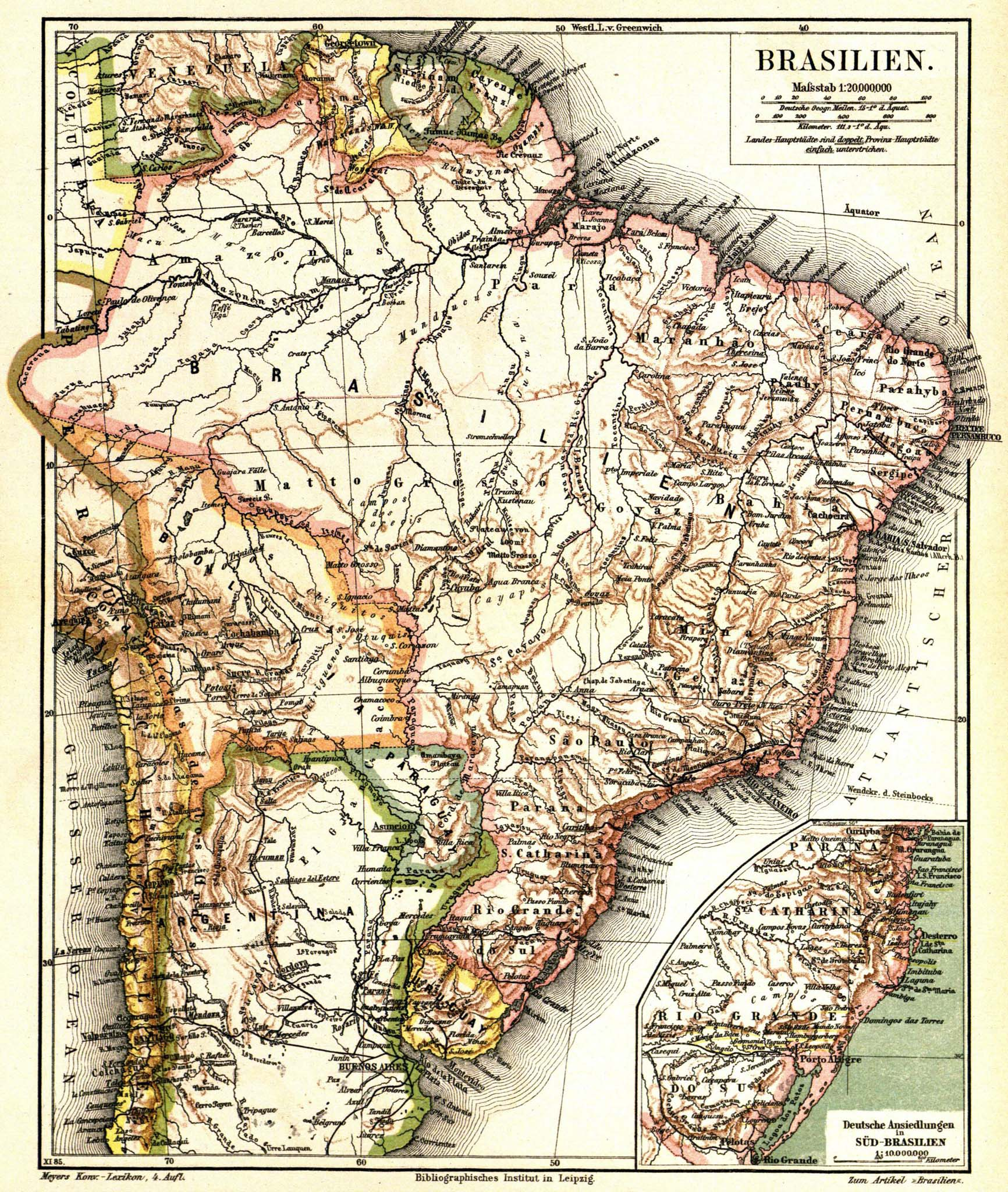 Brasilien (1 : 20.000.000)